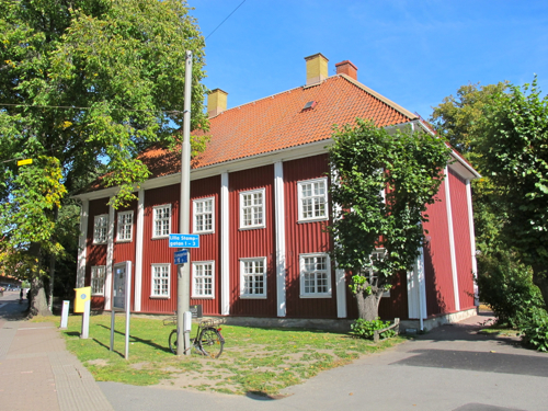 Fattighuset vid Fattighusån på Stampen i Göteborg